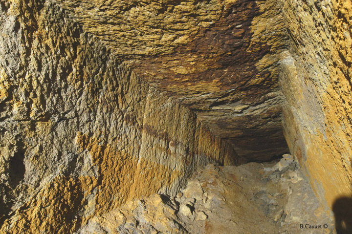 Galeria Cătălina Monulești